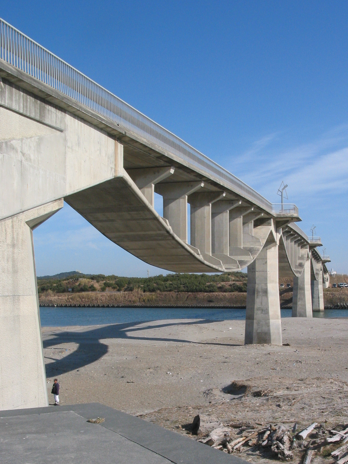 Shiosai Bridge 潮騒橋 静岡県掛川市国安で撮影